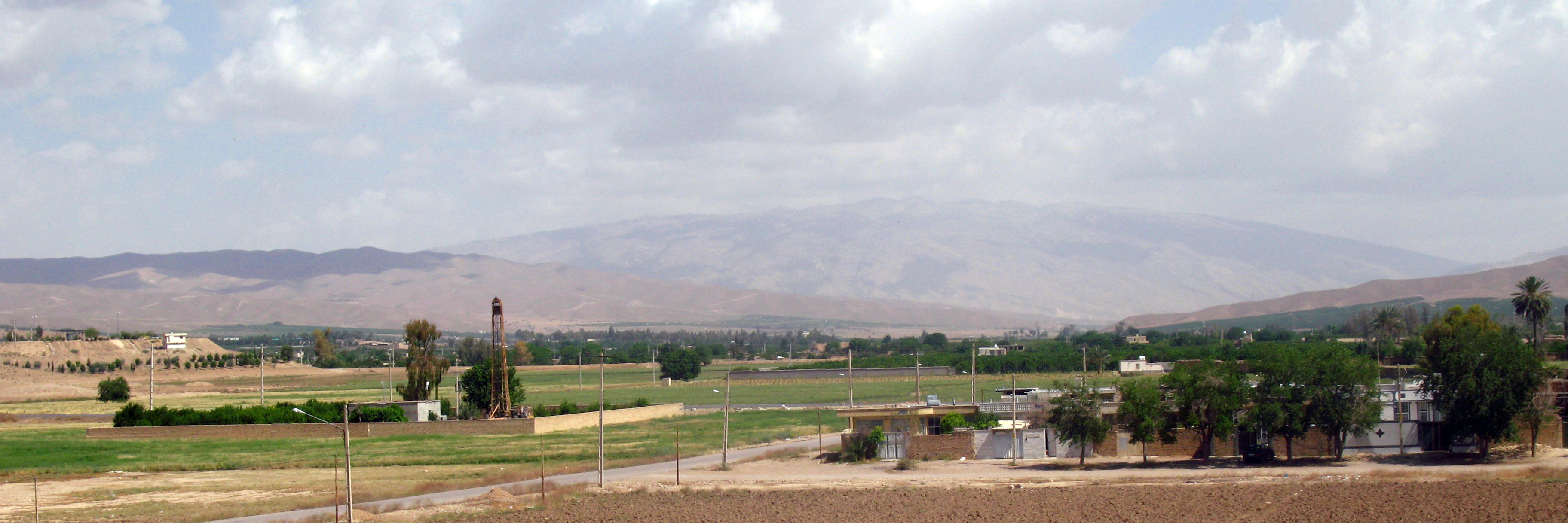 Kharmankooh pas az baran-88